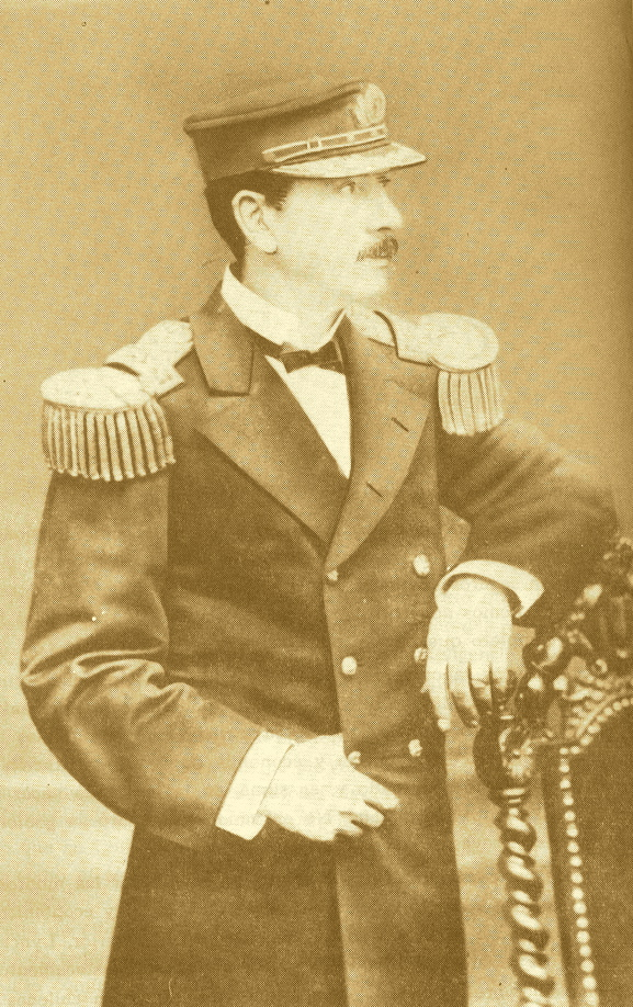 Patricio Lynch (1825-1886), vicealmirante de la Armada de Chile. Comandante de la 1ª. División del Ejército chileno en las batallas de Chorrillos y Miraflores.